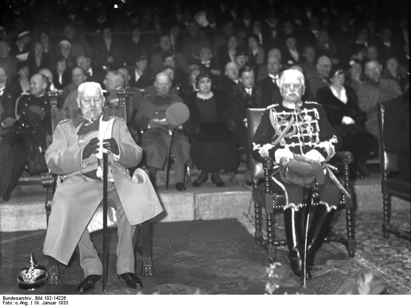 Die grosse Reichsgründungsfeier des Deutschen Reichskriegerbundes Kyffhäuser im Sportpalast in Berlin! Reichspräsident [Paul] von Hindenburg auf dem Ehrenplatz während der Feier beim Lesen des Programmes.